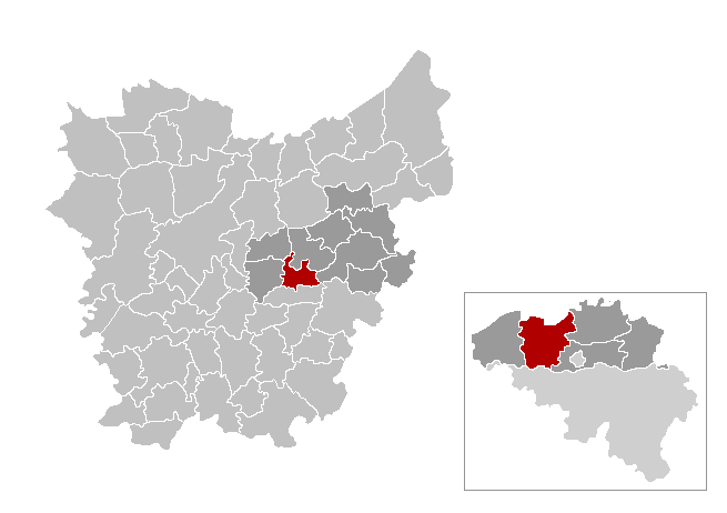 Gemeentekaart, eigen werk Categorie:Kaart met locatie Belgische gemeente